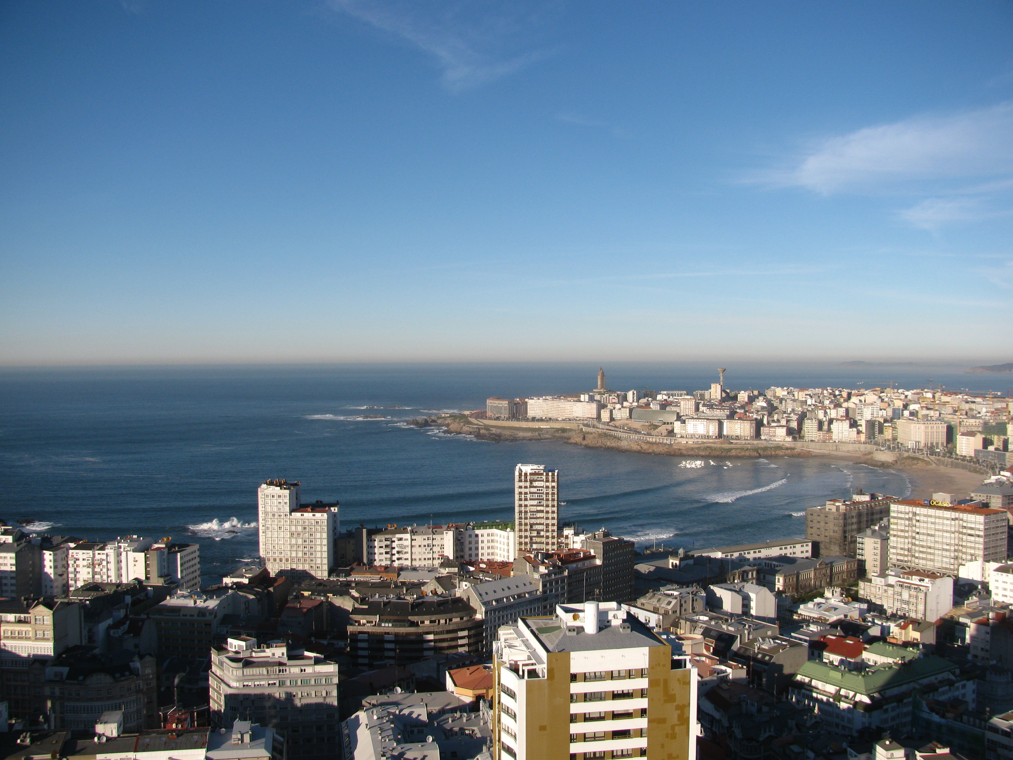 Enseada do Orzán (A Coruña).